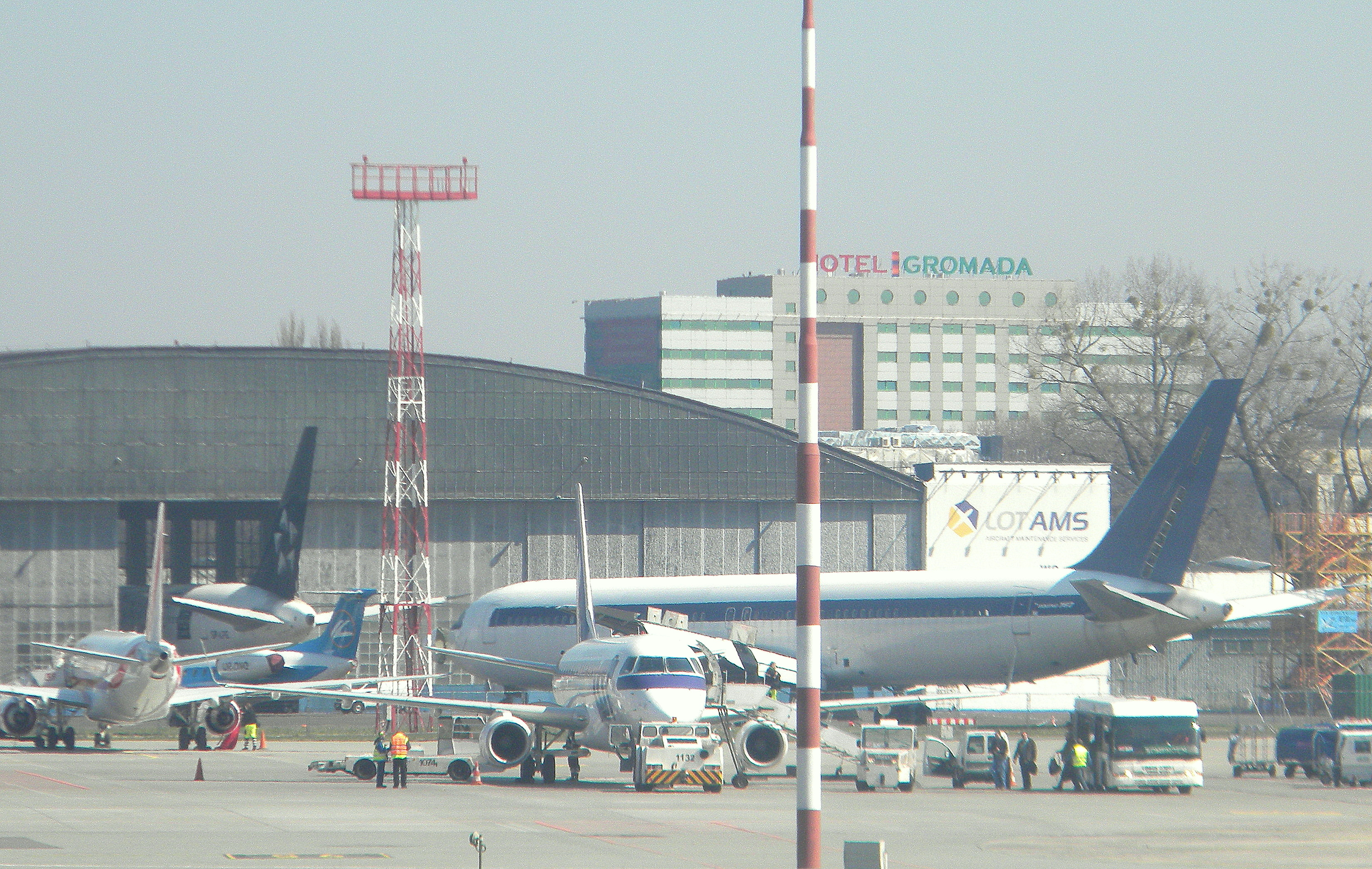 B767 Kapitana Wrony w czasie cięcia na części na lotnisku Okęcie.